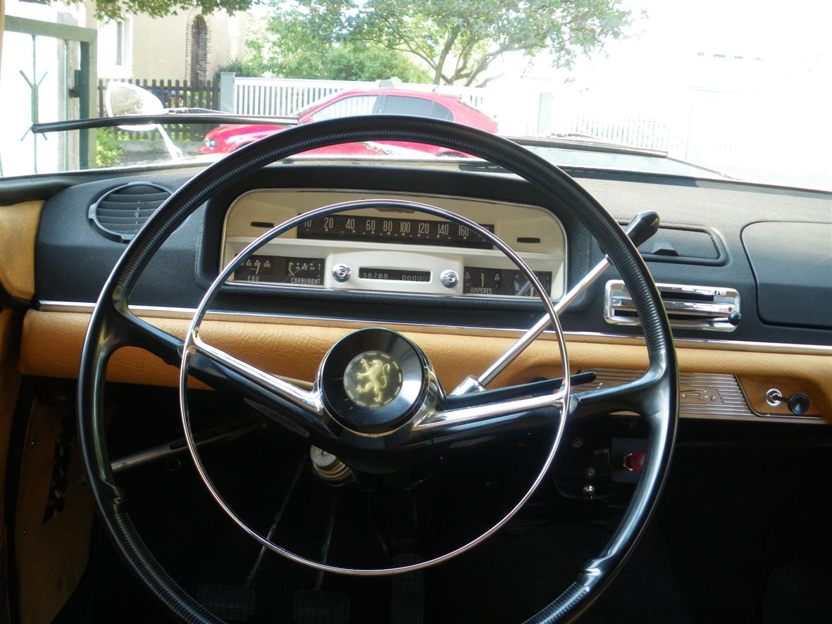 Instrumentenbrett im Peugeot 404 Super Luxe von 1962. Helles Leder und Edelstahl.